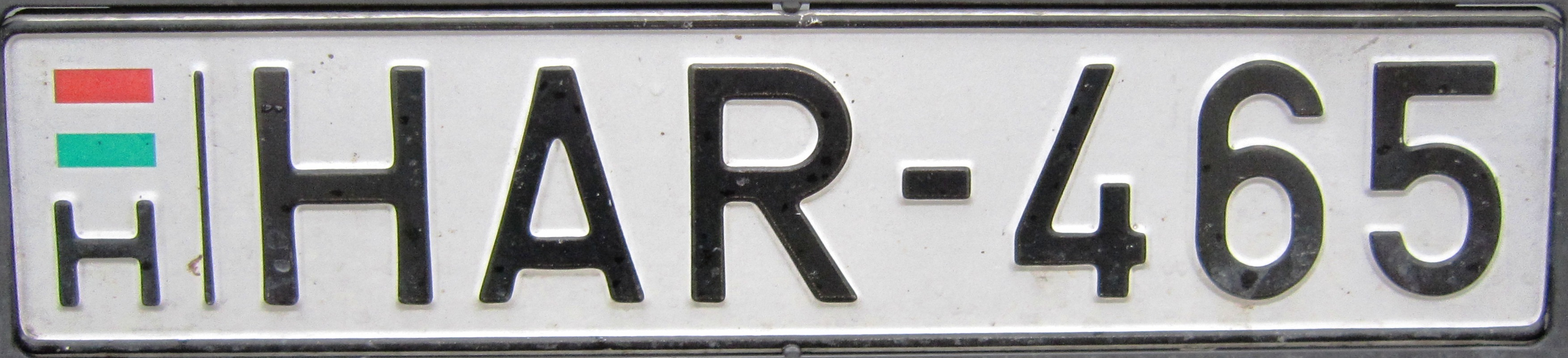 kentekenplaat Hongarije oud